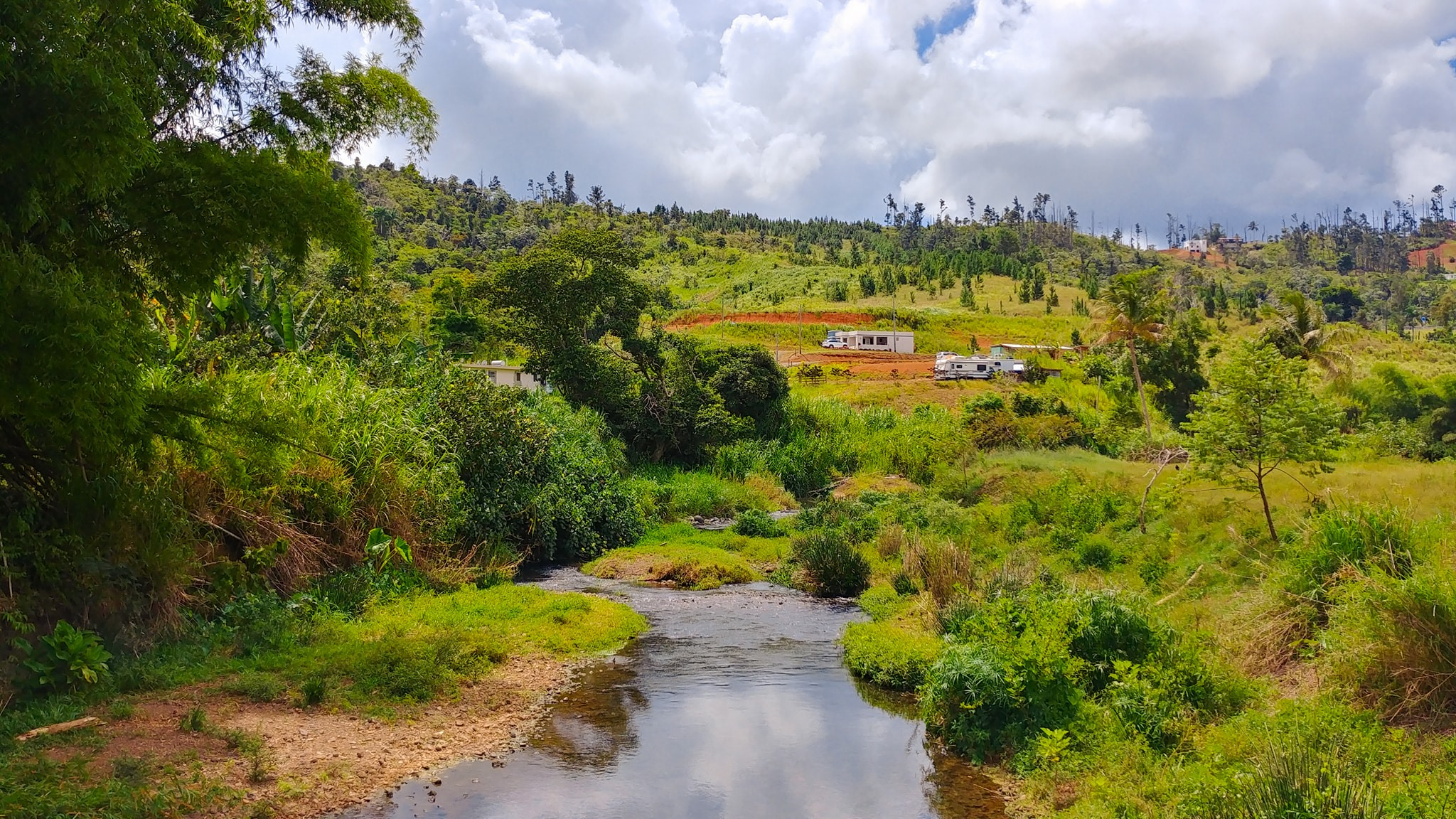 Río Grande de Manatí, Corozal, Puerto Rico (2020)